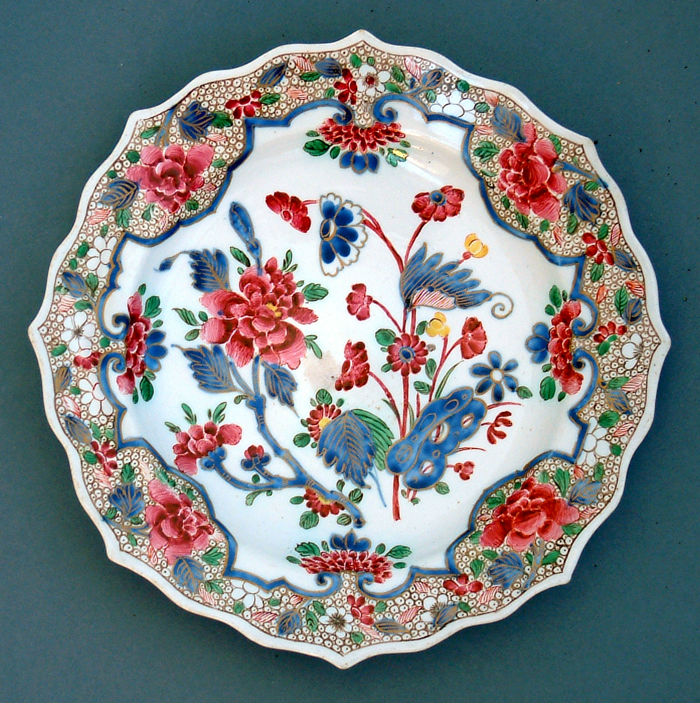 Piatto con decoro floreale all'orientale. Ginori a Doccia, metà del XVIII secolo